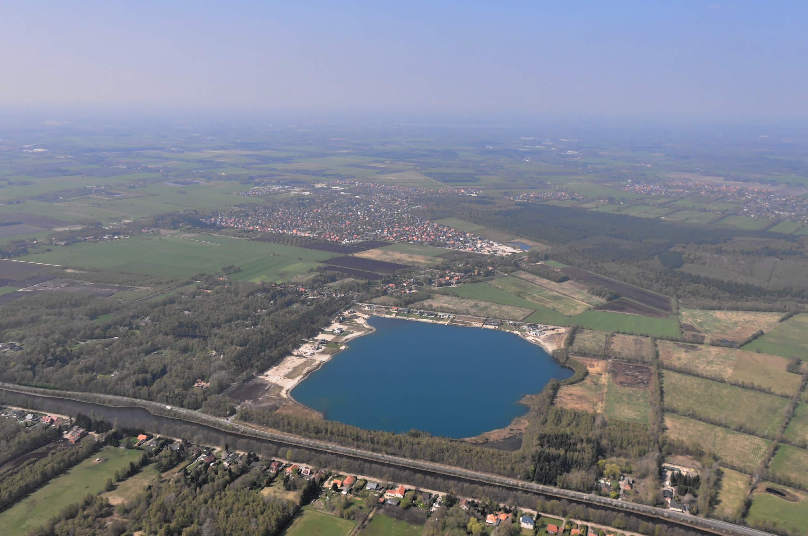 Luftbilder von der Nordseeküste 2013-05